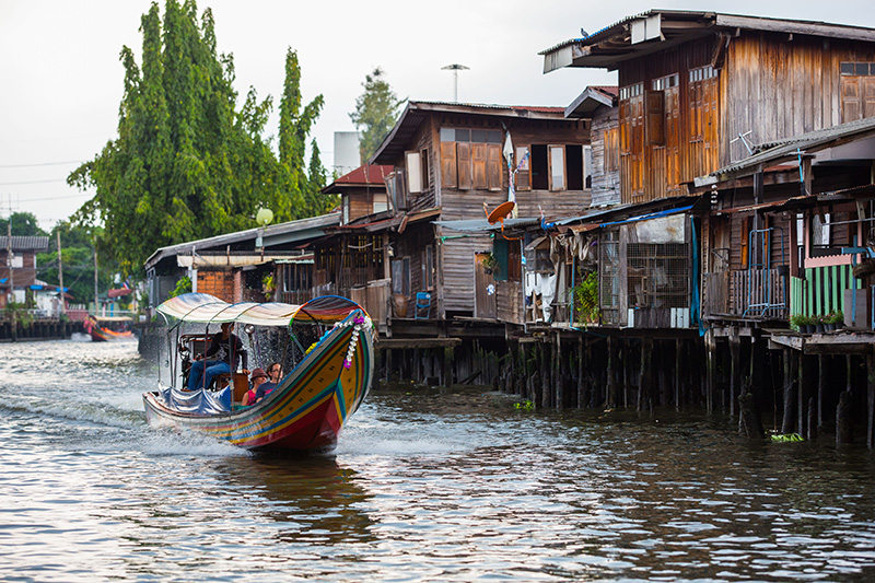 เป็นคลองธรรมชาติคลองหนึ่งที่ตั้งอยู่ระหว่างเขตบางกอกใหญ่และเขตบางกอกน้อย ที่มาของชื่อคลองมาจากที่ริมสองฝั่งคลองเป็นชุมชนชาวมอญเรียงรายกันไปตลอดแนว